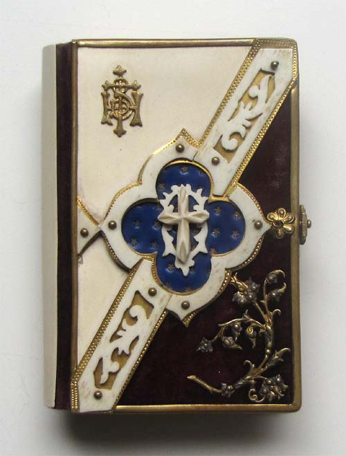 Gebetbuch um 1900 der Firma J. Steinbrener